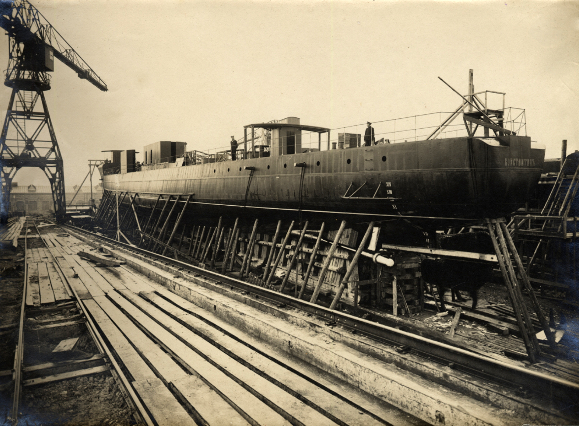 Miiniristleja Konstantin enne veeskamist Vene-Balti laevatehases